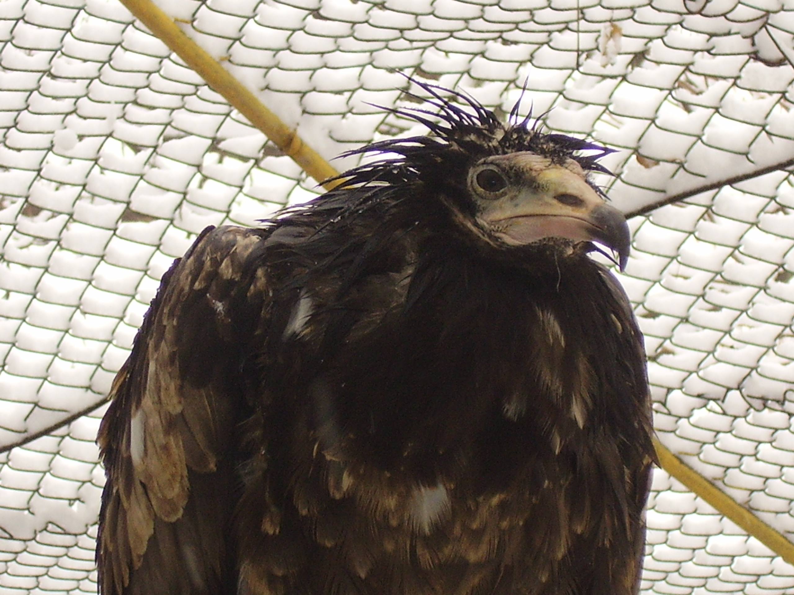 a Bird